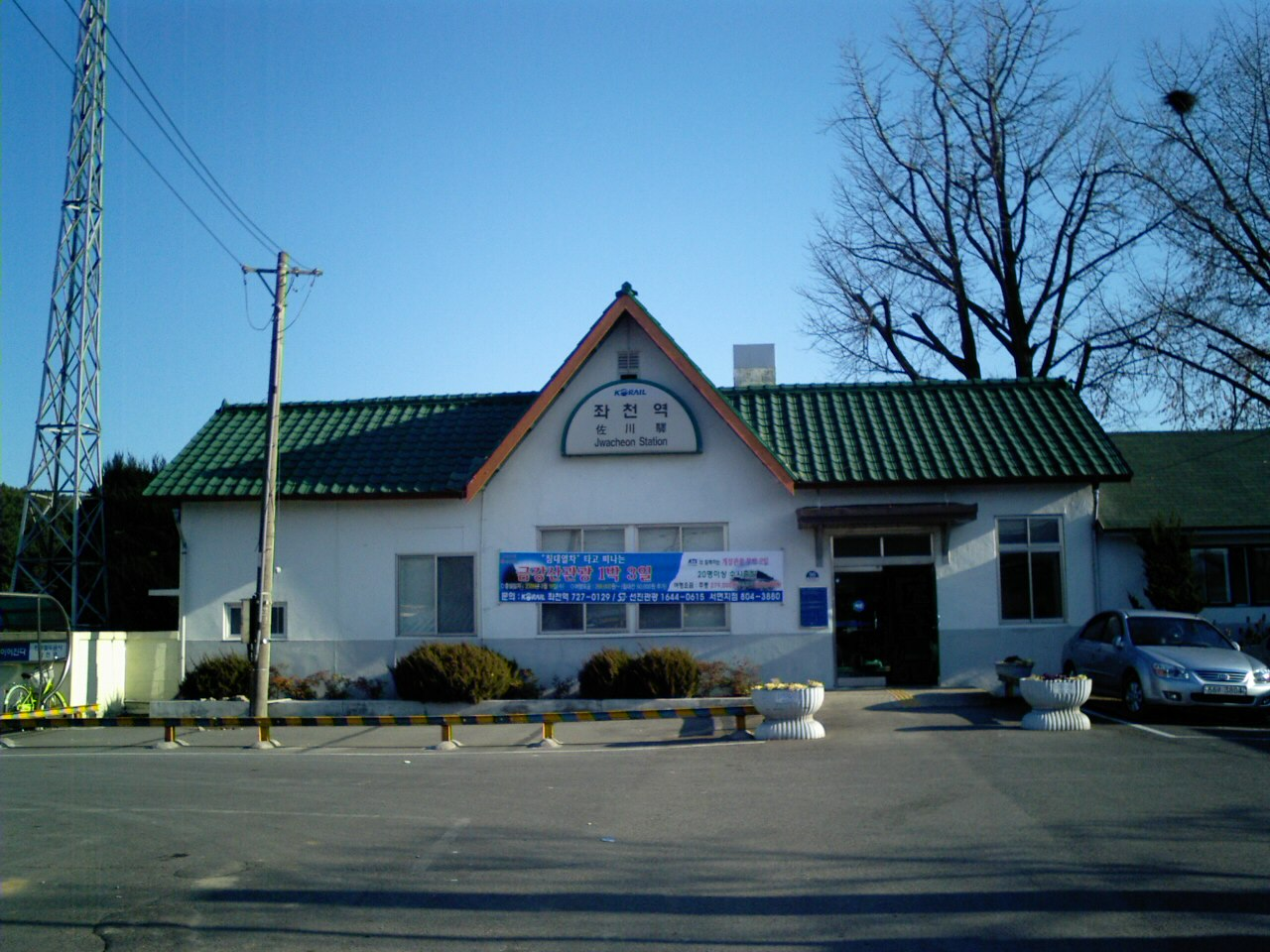 동해남부선 좌천역